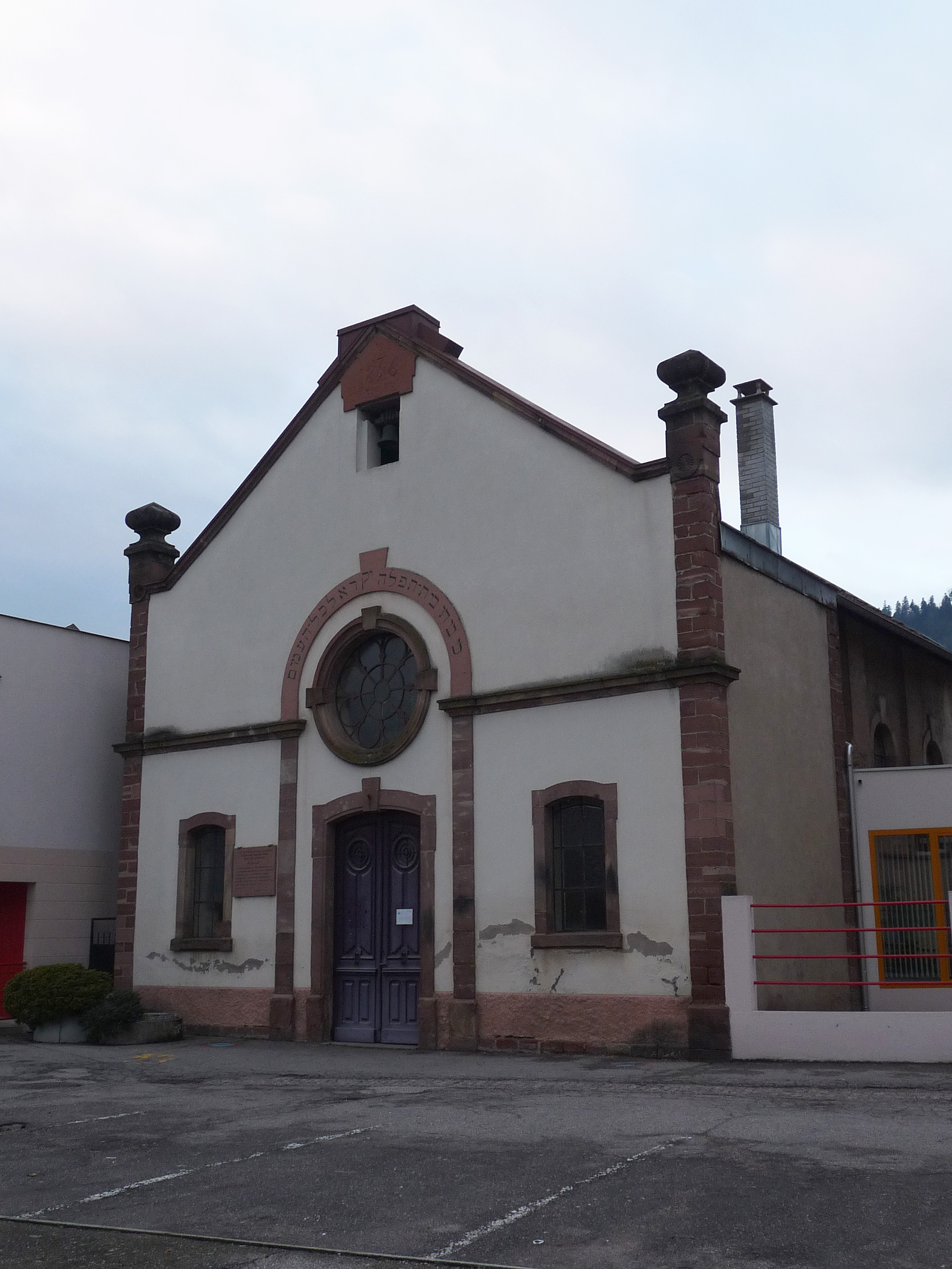 Senones (Vosges) : Ancienne synagogue construite en 1896. Le bâtiment fut donné à l'Eglise réformée en 1949.